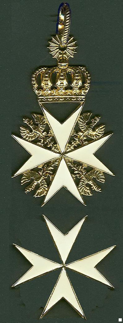 Ordetekens van voor 1918 uit mijn eigen verzameling. Zelf gescand. Robert Prummel 27 mei 2006 22:39 (CEST)